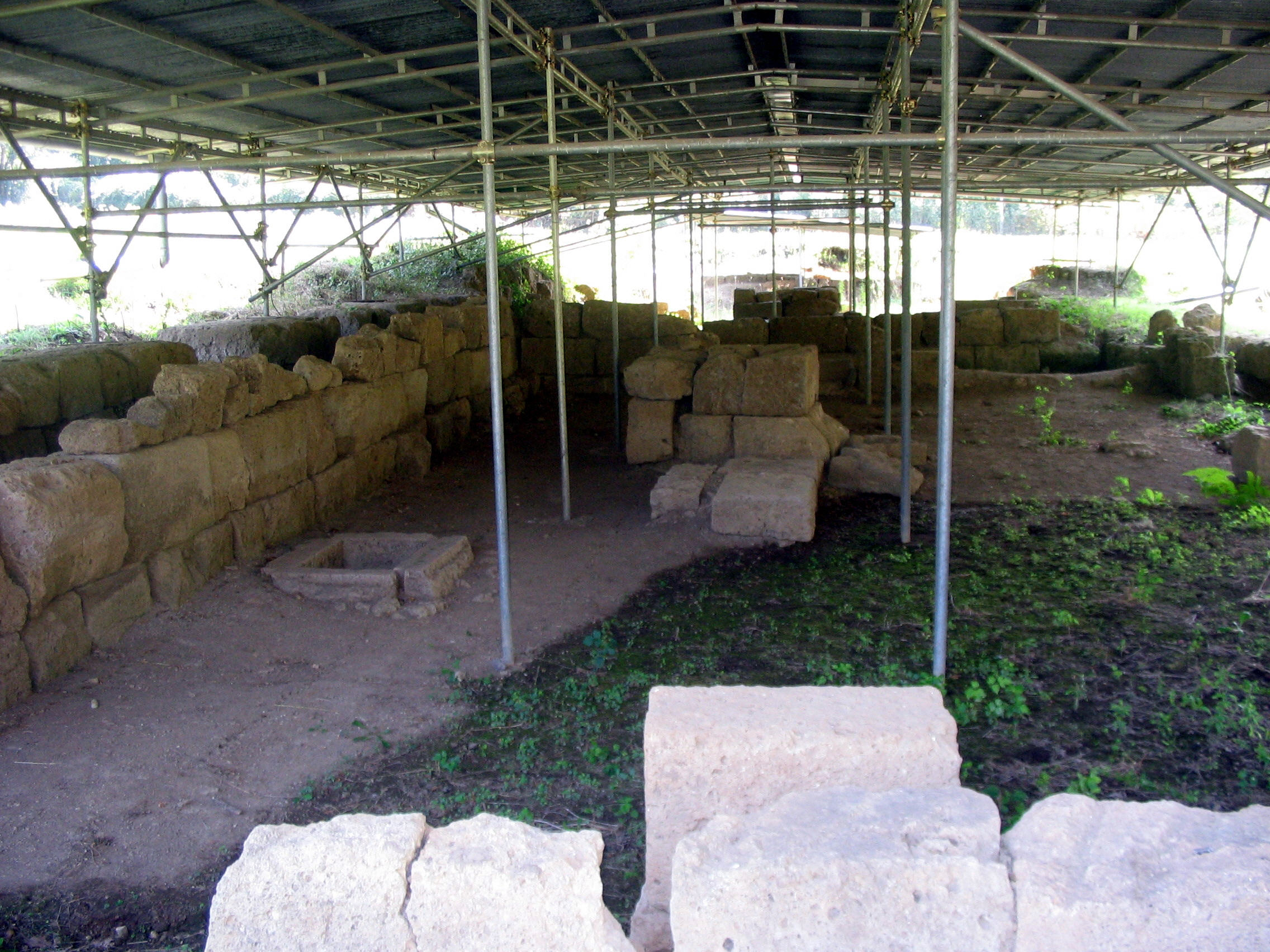 Narce, Valle della Treja, Lazio, Italia